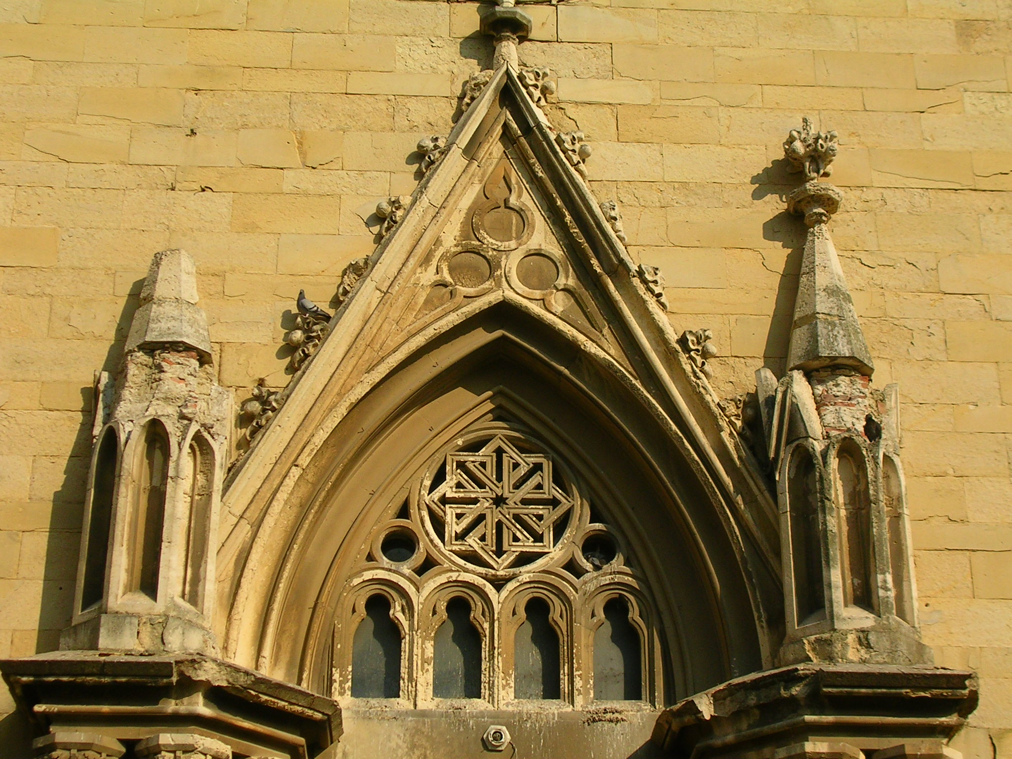 Livorno: la chiesa della Congregazione Olandese Alemanna (1862-1864), il luogo di culto protestante della comunità labronica proveniente dall'Europa settentrionale. Si trova davanti al Fosso Reale, lungo un tratto crollato alcuni anni fa e ancora lasciato in cemento armato a facciavista. Peraltro, la chiesa, in stile neogotico, è in stato di completo abbandono e l'interno presenta una volta semicrollata. Nella foto: particolare dello stato di degrado del rivestimento lapideo sopra il portone d'accesso.